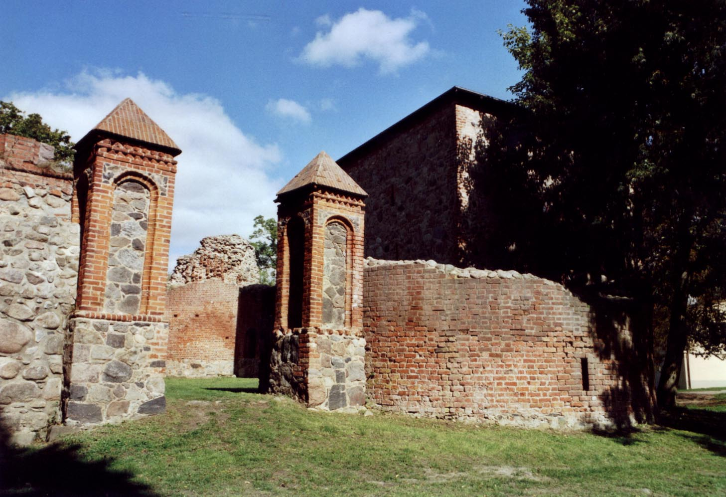 Burg Gerswalde, Bastion an der Ostseite, selbst fotografiert, MacElch (Rainer Kunze), 2006